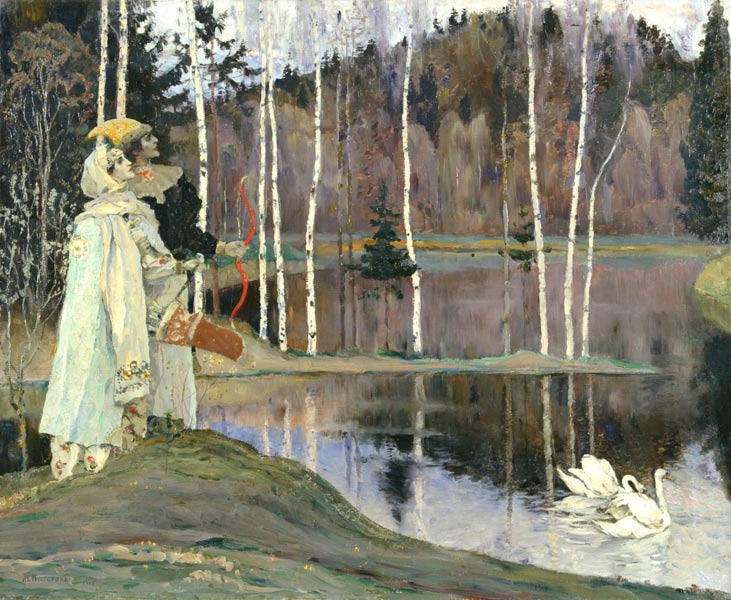 М.НЕСТЕРОВ. Два лада.1905 год В 1905 году Нестеров создал оду счастливой любви "Два лада", воспев свои чувства к юной Екатерине Васильевой.